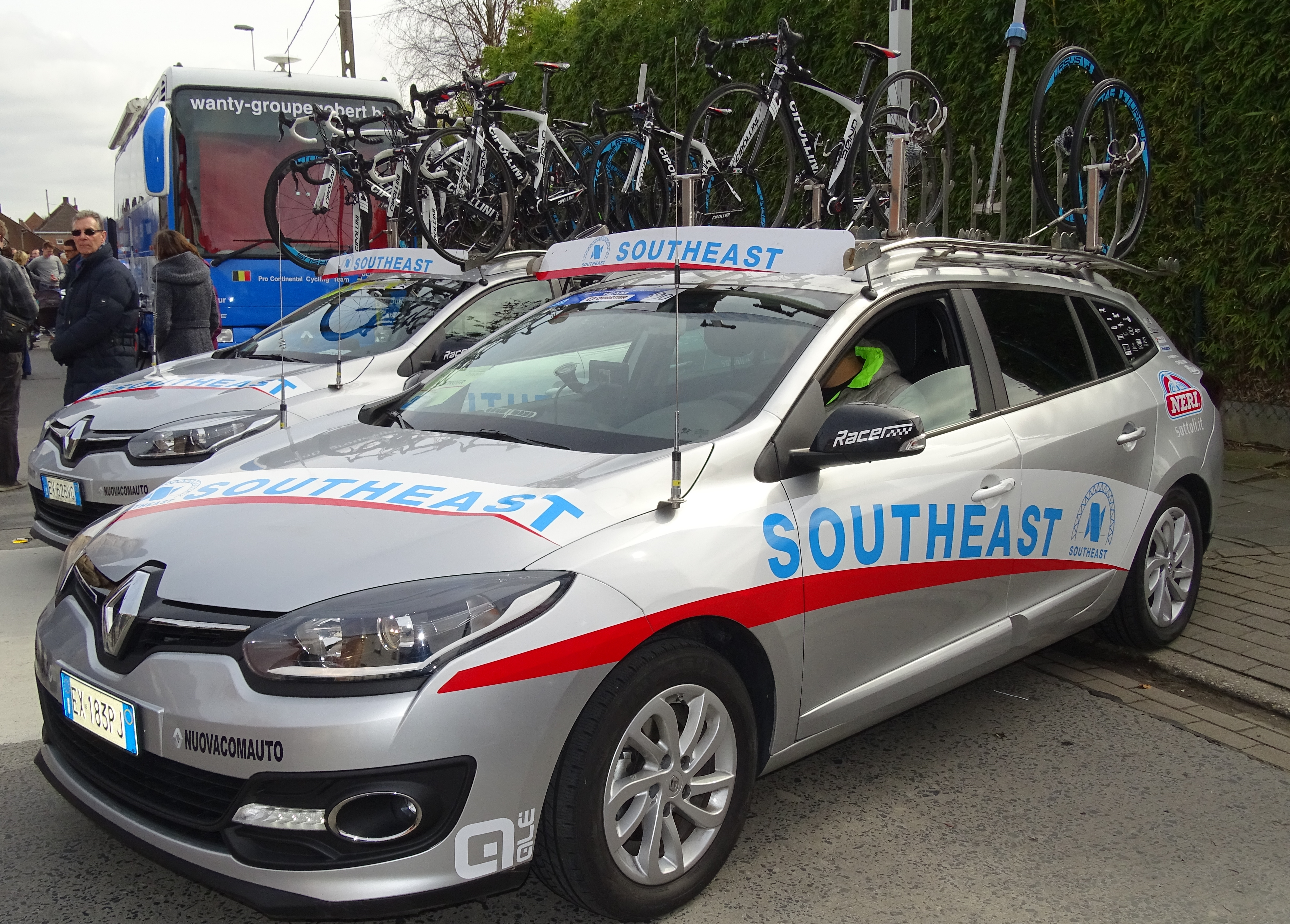 Reportage réalisé le vendredi 27 mars à l'occasion du départ et de l'arrivée du Grand Prix E3 2015 à Harelbeke, Belgique.